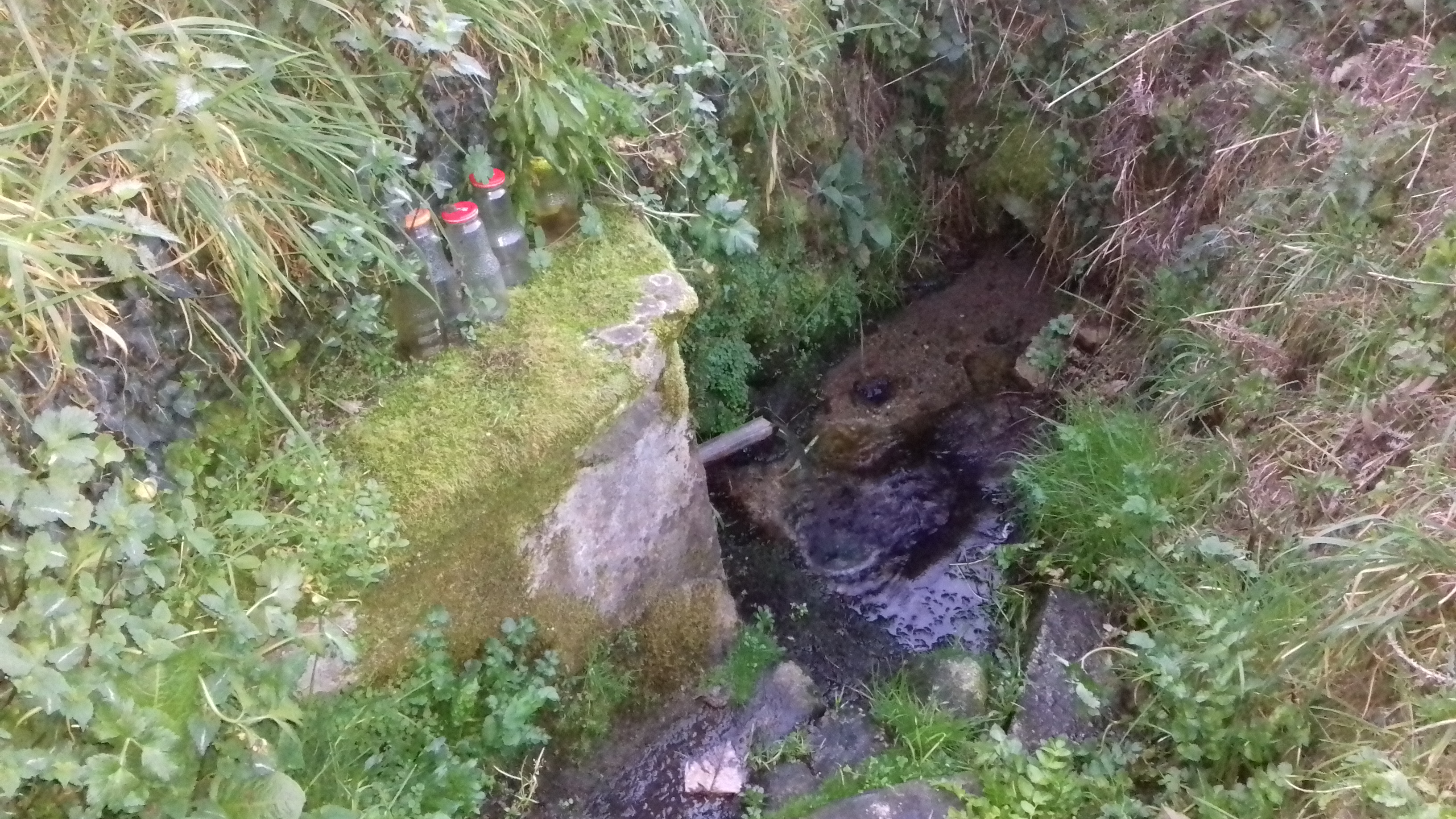 Fonte de Mizoite de Abaixo